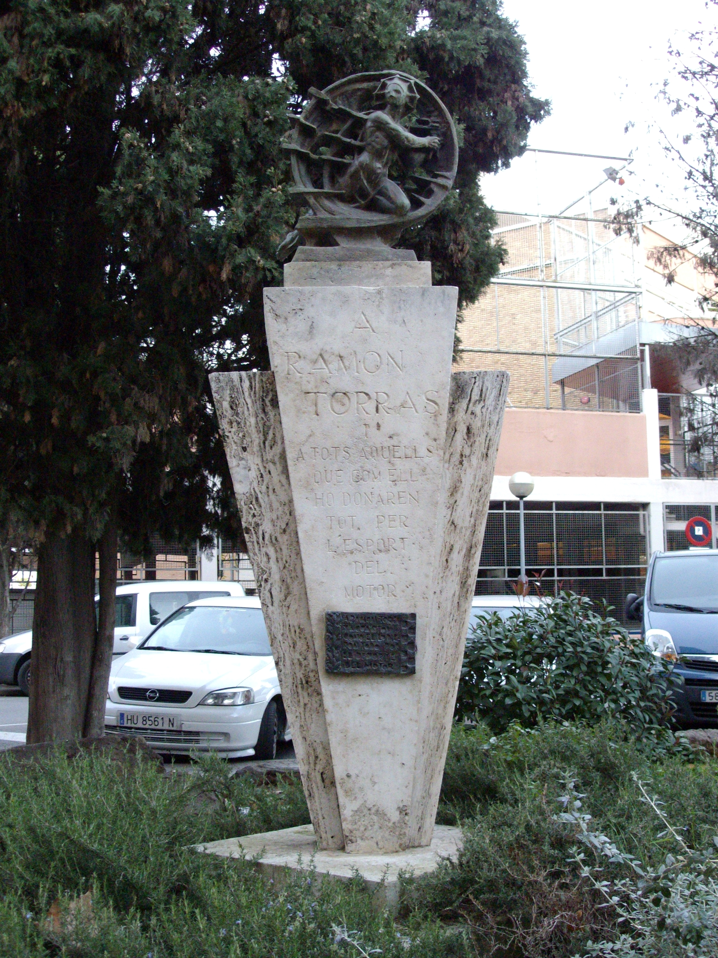 La rueda de la fortuna, monumento a Ramón Torras, motociclista catalán fallecido el 30 de mayo de 1965 (22 años) en una carrera en Coma-Ruga. El monumento, obra de Luis Ortega Bru y Adolf Salanguera, fue inaugurado el 27 de abril de 1974 y fue construido gracias a la suscripción popular de los lectores de la revista Motociclismo. Está situado en la confluencia de la calle Sol y Padris con la avenida Sabadell, junto al Palacio Municipal de Deportes de Sabadell.